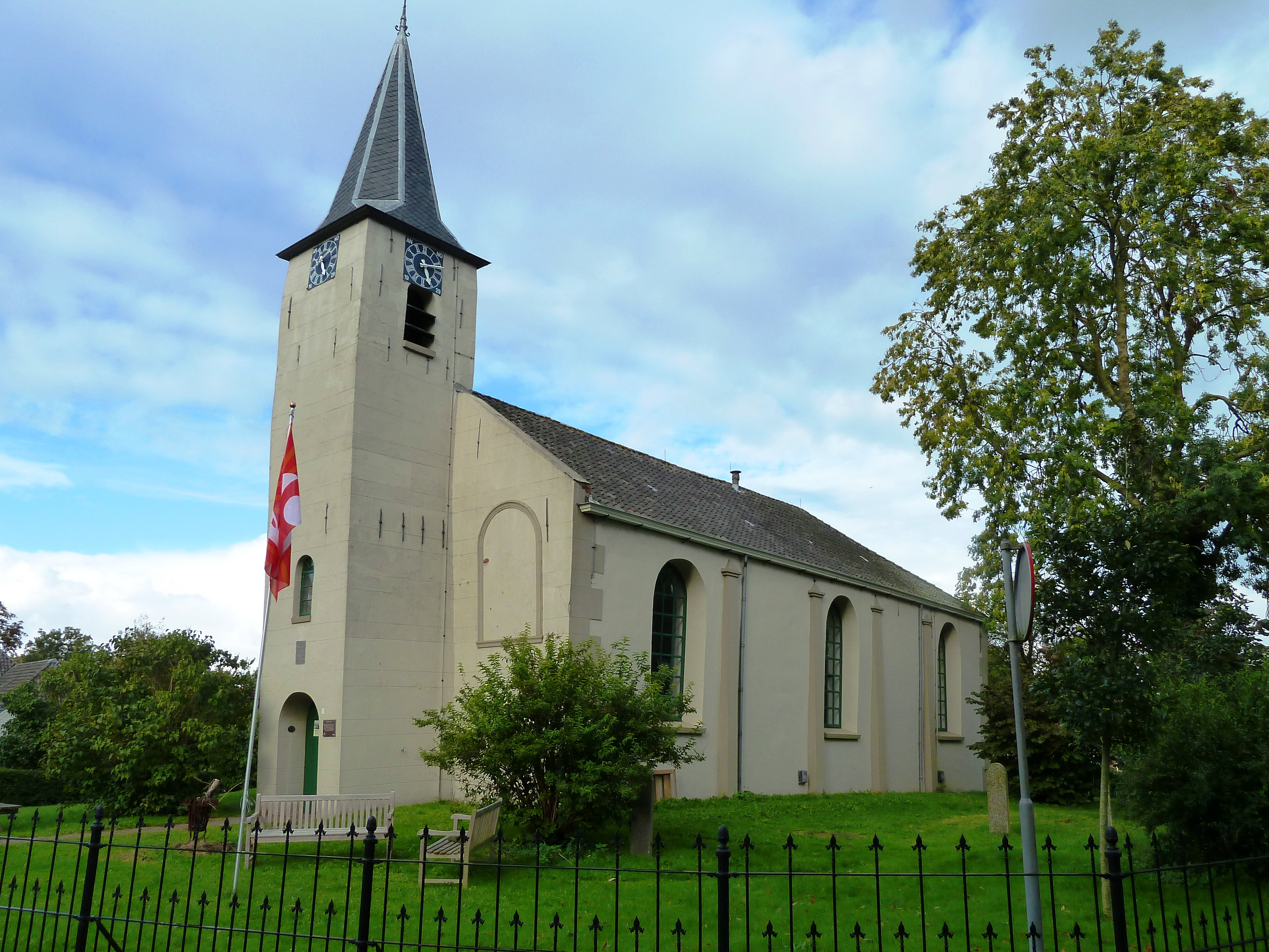 Kerk van Feerwerd